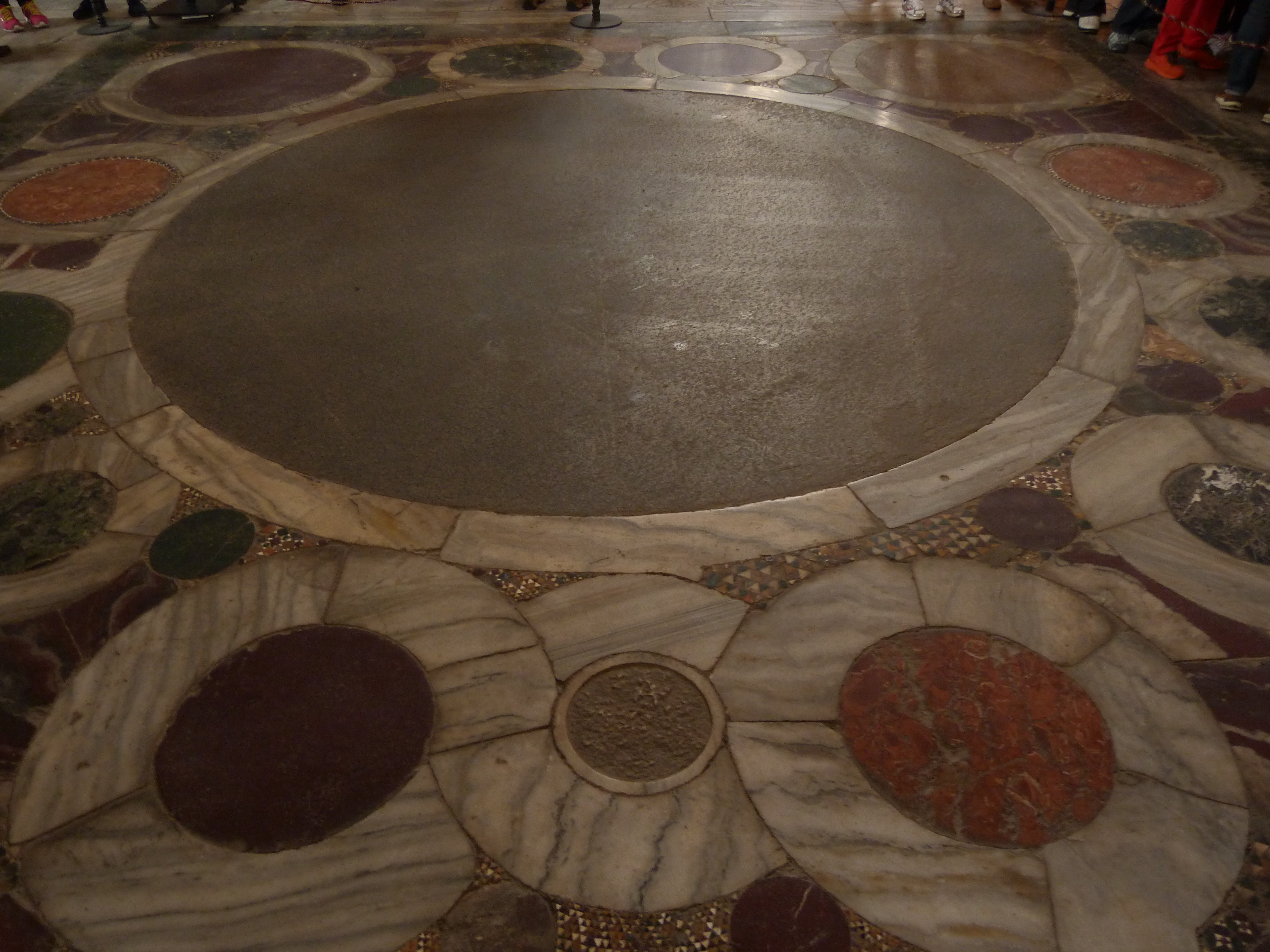 A felvétel 2014. október 23-án csütörtökön készült. Törökország, Isztambul. Hagia Szophia. Az Isteni Bölcsesség temploma. Az 563 december 24-én felszentelt keresztény templom mintegy ezer évig a Konstantinápolyi Patriarchátus székhelye, a Bizánci Birodalom szellemi központja. Konstantinápoly török meghódítása után fődzsámi, majd 1935-től napjainkig múzeum. Trónoló Istenanya a gyermek Jézussal, Nagy Konstantin és Justiniánus. Az apszisbeli imafülke két oldalán gyertyatartók, II. Szulejmán Buda első elfoglalásakor szerzett hadizsákmánya. ©© Derzsi Elekes Andor, Budapest, 2014, A kép egészben, vagy részletekben másolását, bármilyen úton történő sokszorosítását és felhasználását a szerző ellenérték nélkül, jogutódjaira is kihatóan megengedi. Az engedély kiterjed a kereskedelmi célú hasznosításra is. Kéri azonban nevének feltüntetését a felhasználás során. A Metapolisz sorozat valamennyi képe és filmje Creative Commons alatti valamint kereskedelmi - for profit - célra is felhasználható. Ajánlott hivatkozás: Derzsi Elekes Andor: Metapolisz DVD line